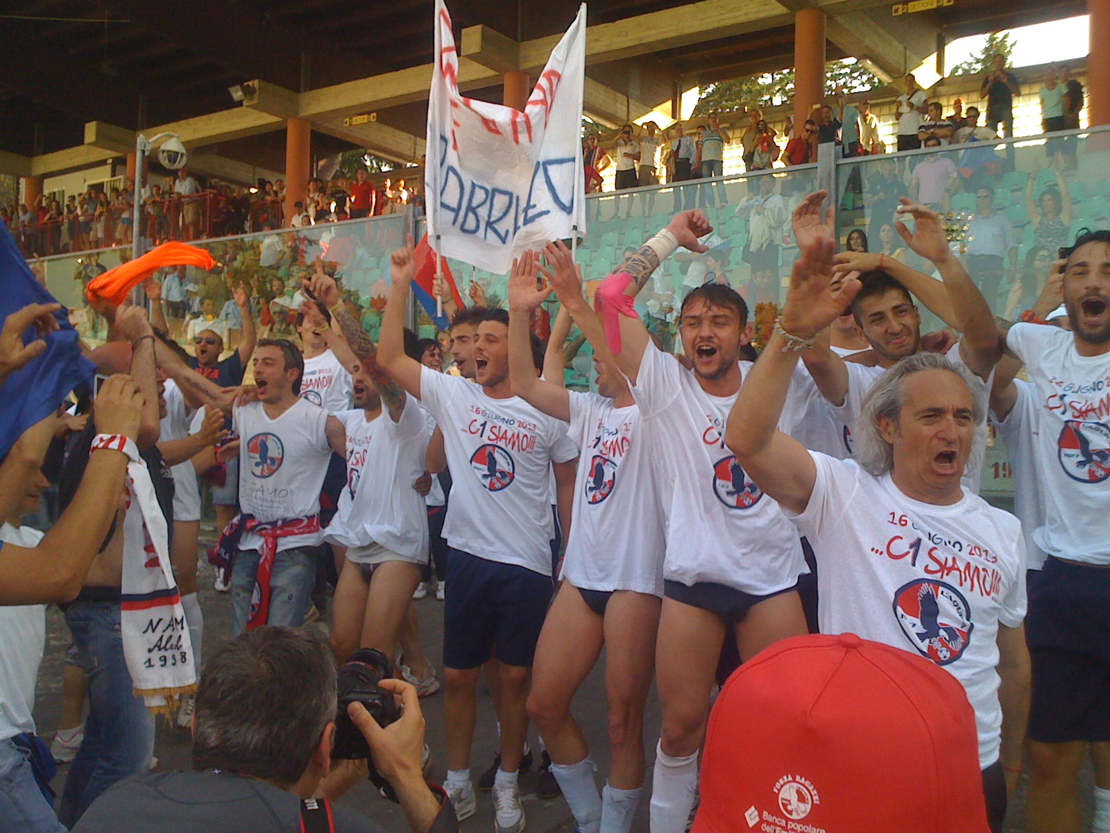 Festeggiamenti in campo dopo L'Aquila-Teramo (finale play-off di Lega Pro Seconda Divisione 2012-2013)